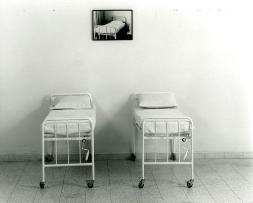 Installation